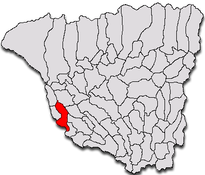 Categorie:Hărţi ale judeţului Gorj